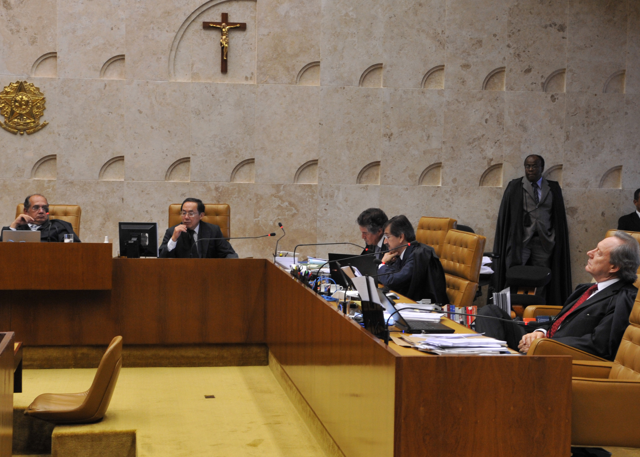 Ministros do STF no julgamento do processo de pedido de extradição do ex-ativista político italiano Cesare Battisti